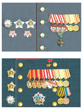 Награды 43-45